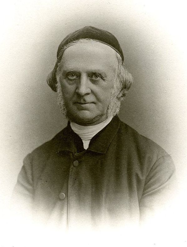 Christian Oberhey (1818 – 1905); Brustbild, sitzend, geradeaus blickend; deutscher evangelisch-lutherischer Theologe, Pastor in der Evangelisch-lutherischen Landeskirche in Braunschweig und Hymnologe; Fotograf Georg Meyer